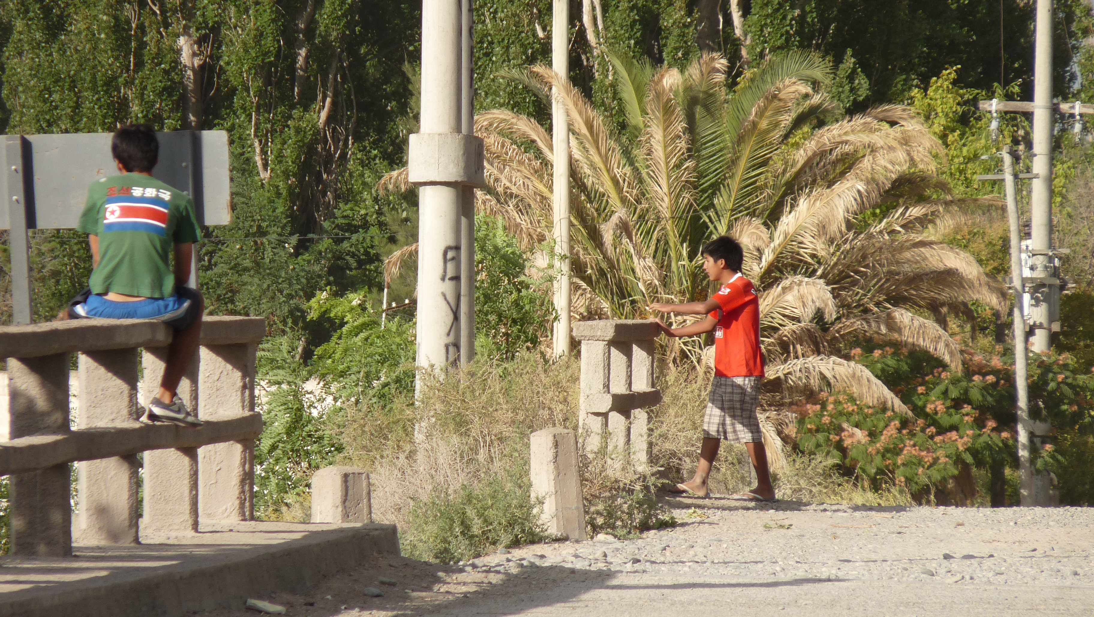 Tarde en el puente San Cristobal, en la provincia del Chubut